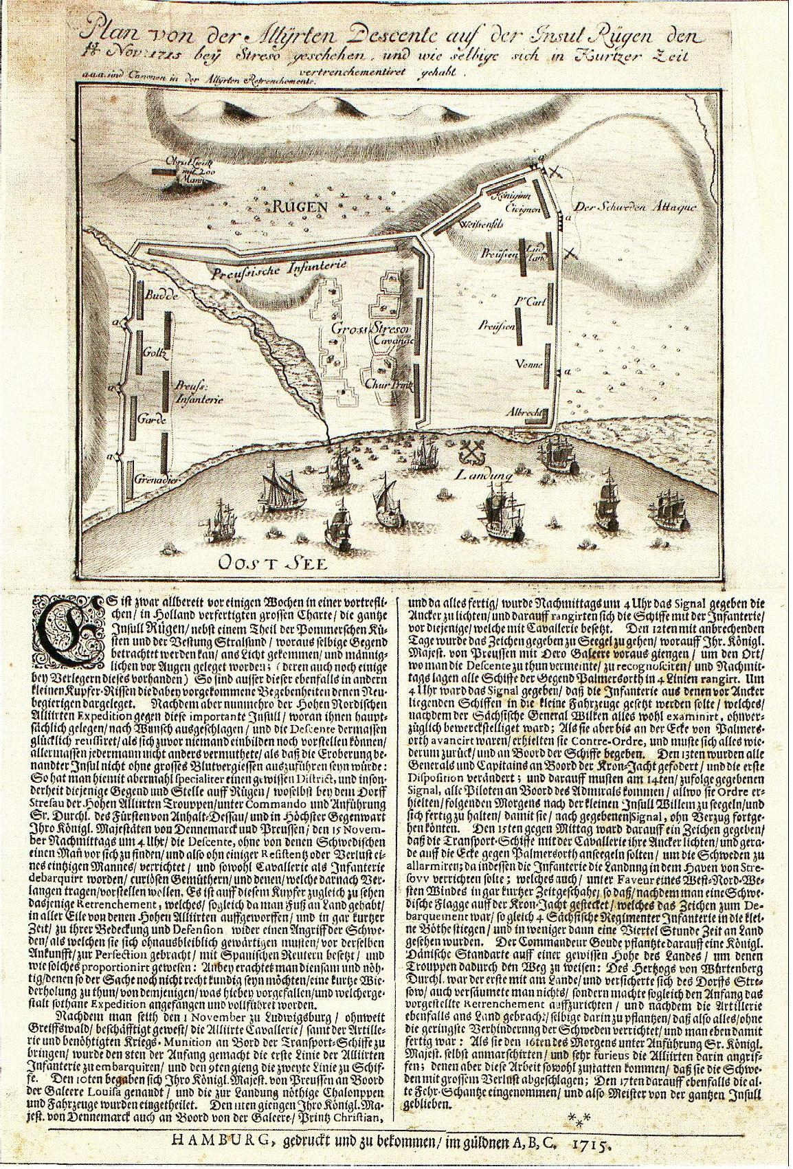 Flugblatt zur Landung der Alliierten auf der Insel Rügen bei Groß-Stresow, 15./16. November 1715, im guldenen ABC